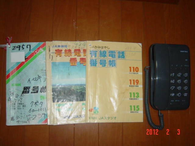 電話帳（左から８０年代→９０年代中頃→２００３年)と電話機